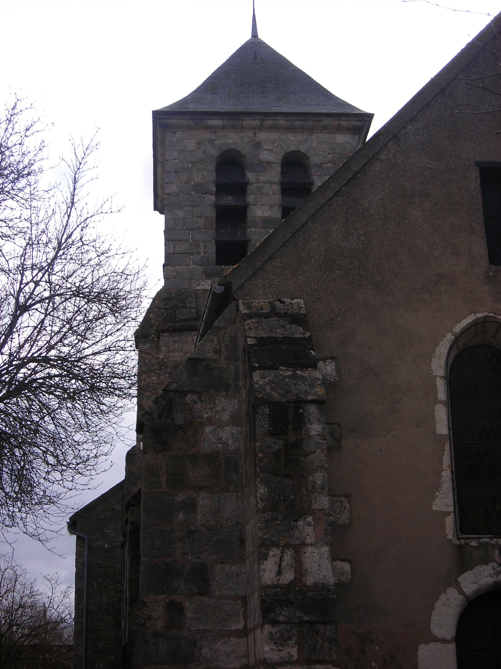 Montigny-sur-Long